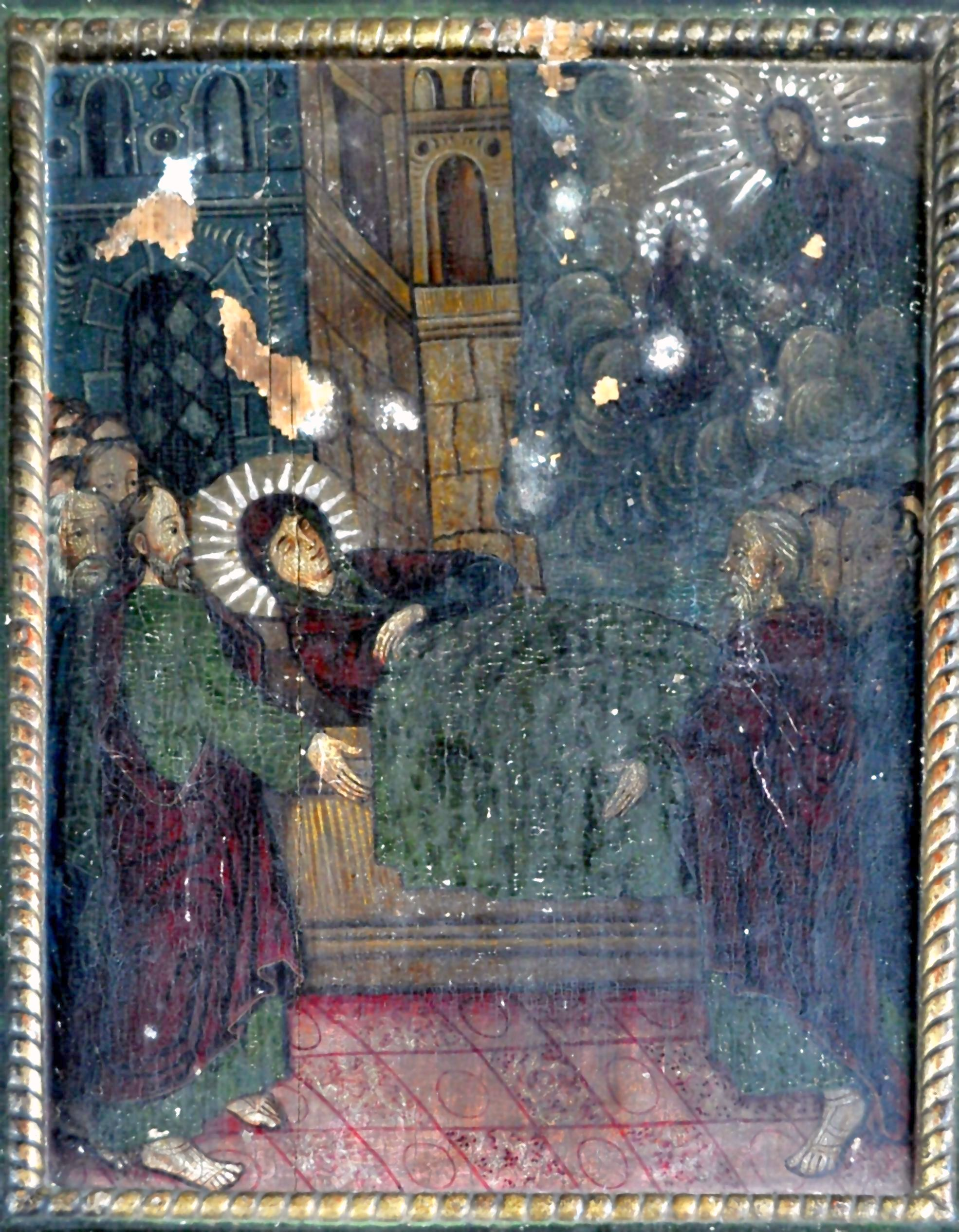 Biserica din Mănăstireni, județul Cluj (icoanele de patrimoniu)